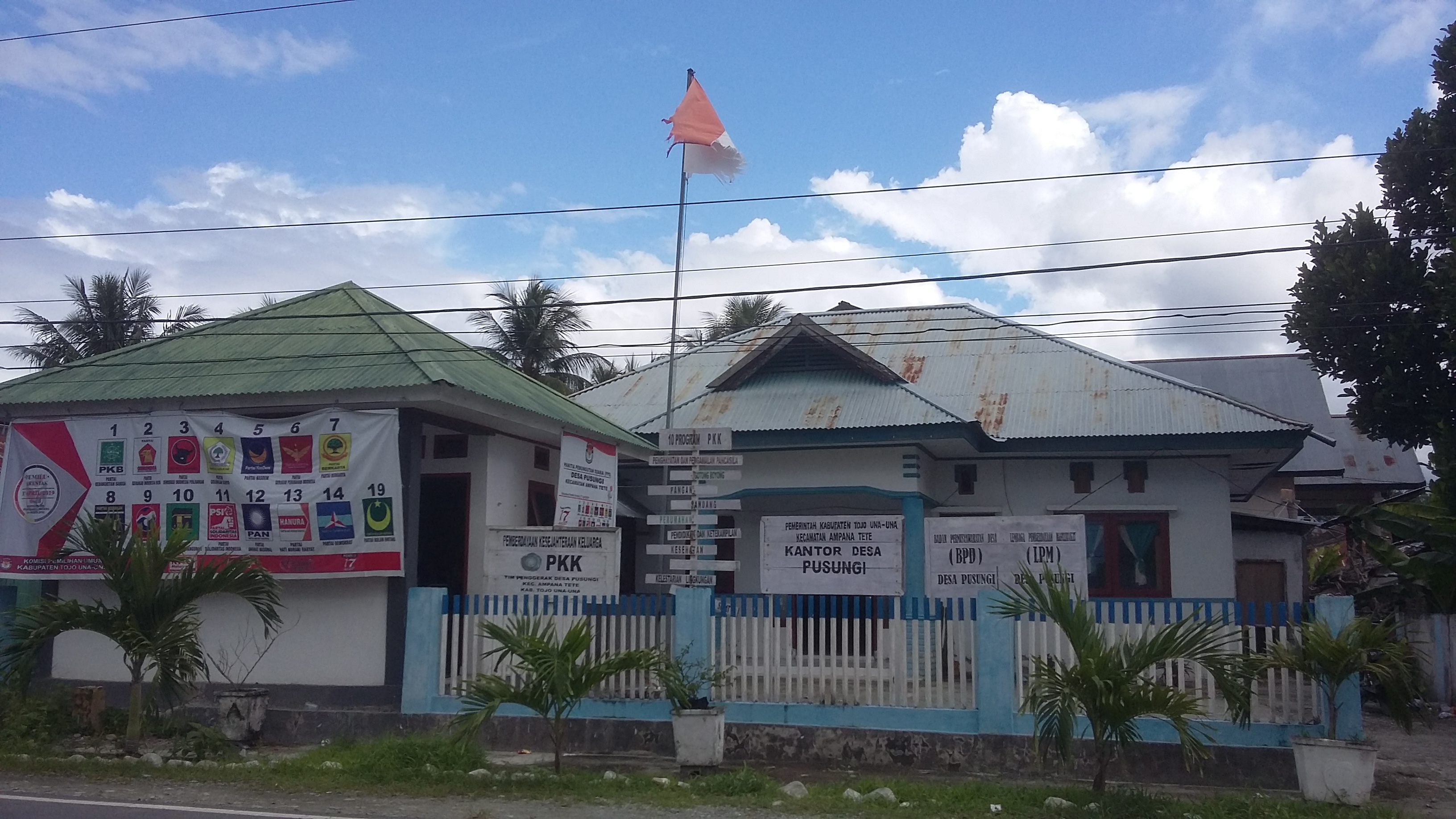 Kantor Desa Pusungi, Kecamatan Ampana Tete, Kabupaten Tojo Una-Una.